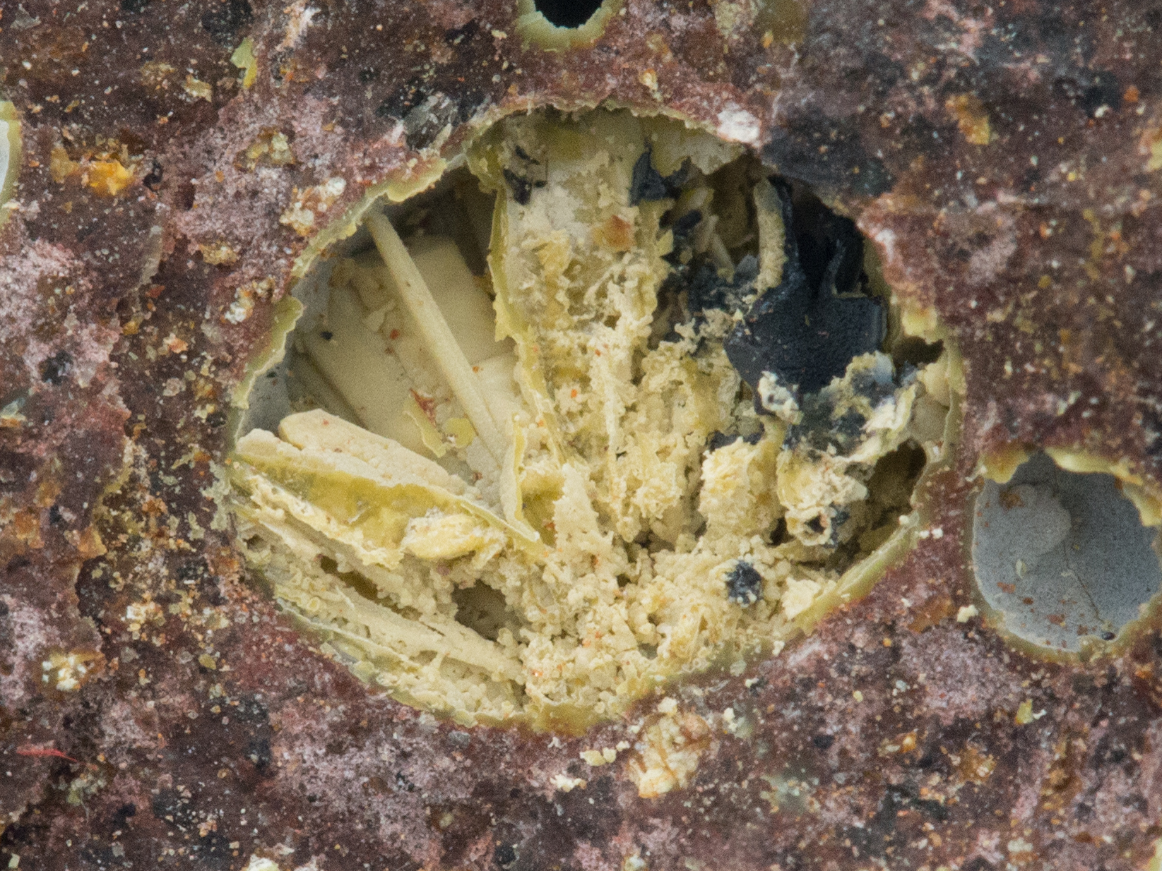 Nontronita càlcica dins un vacúol basàltic, de la pedrera Can Súria (Maçanet de la Selva). Col·lecció Joan Garcia